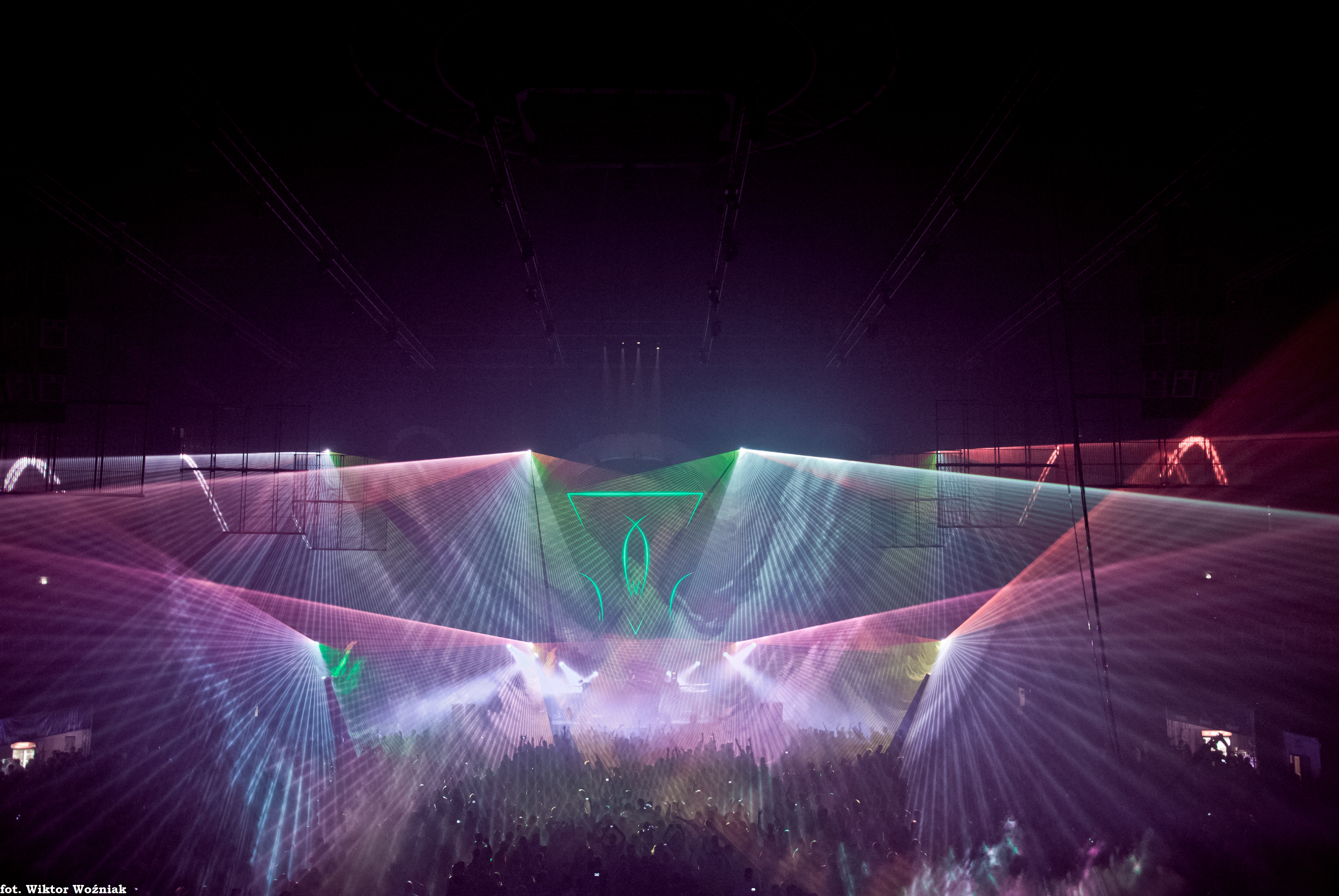 Transmission 2012: The Spiritual Gateway